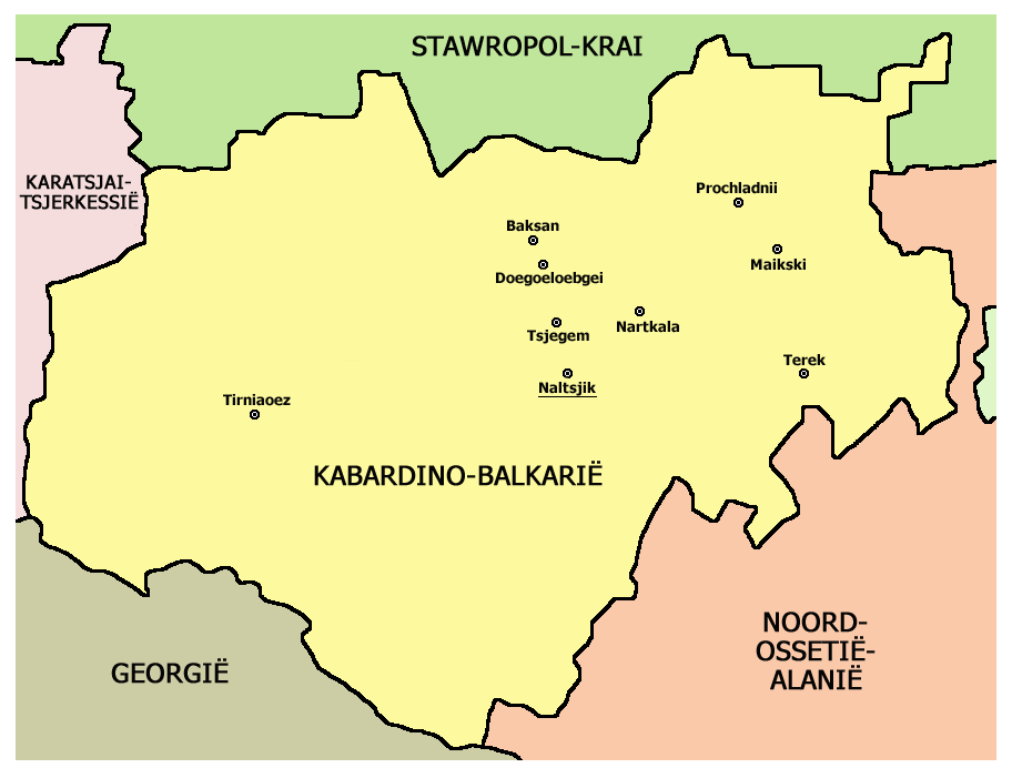 Kaart van Kabardino-Balkarië in Rusland